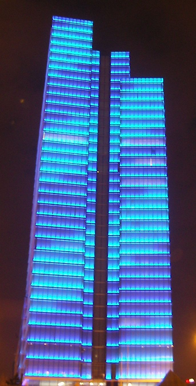 Dexia Tower bei Nacht (Medienfassade)